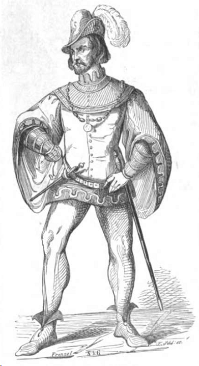 Orsine – Hr. Wächter.